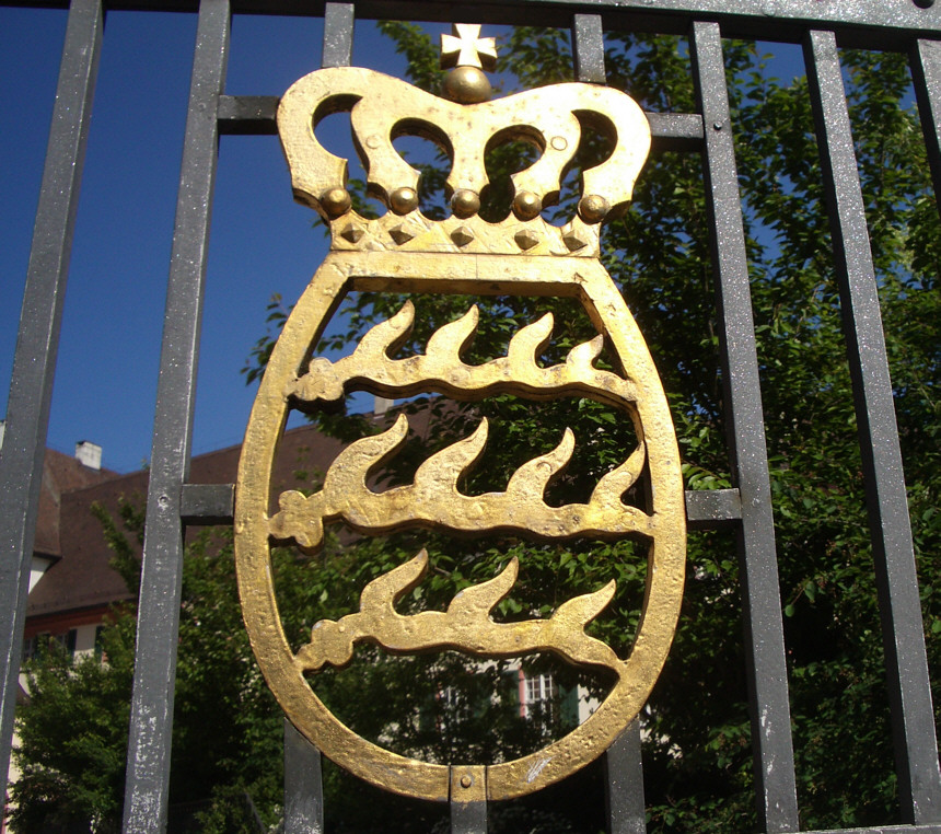 Altshausen, Germany: Seiteneingang, Wappen des Hauses Württemberg